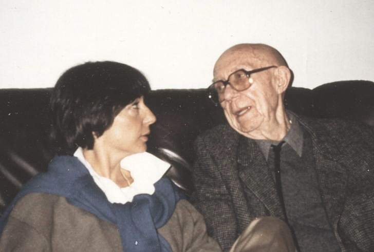 Photographie de Louis Scutenaire, poète surréaliste belge, dans le salon de sa maison de la rue de la Luzerne à Bruxelles (avec Françoise Bernard).